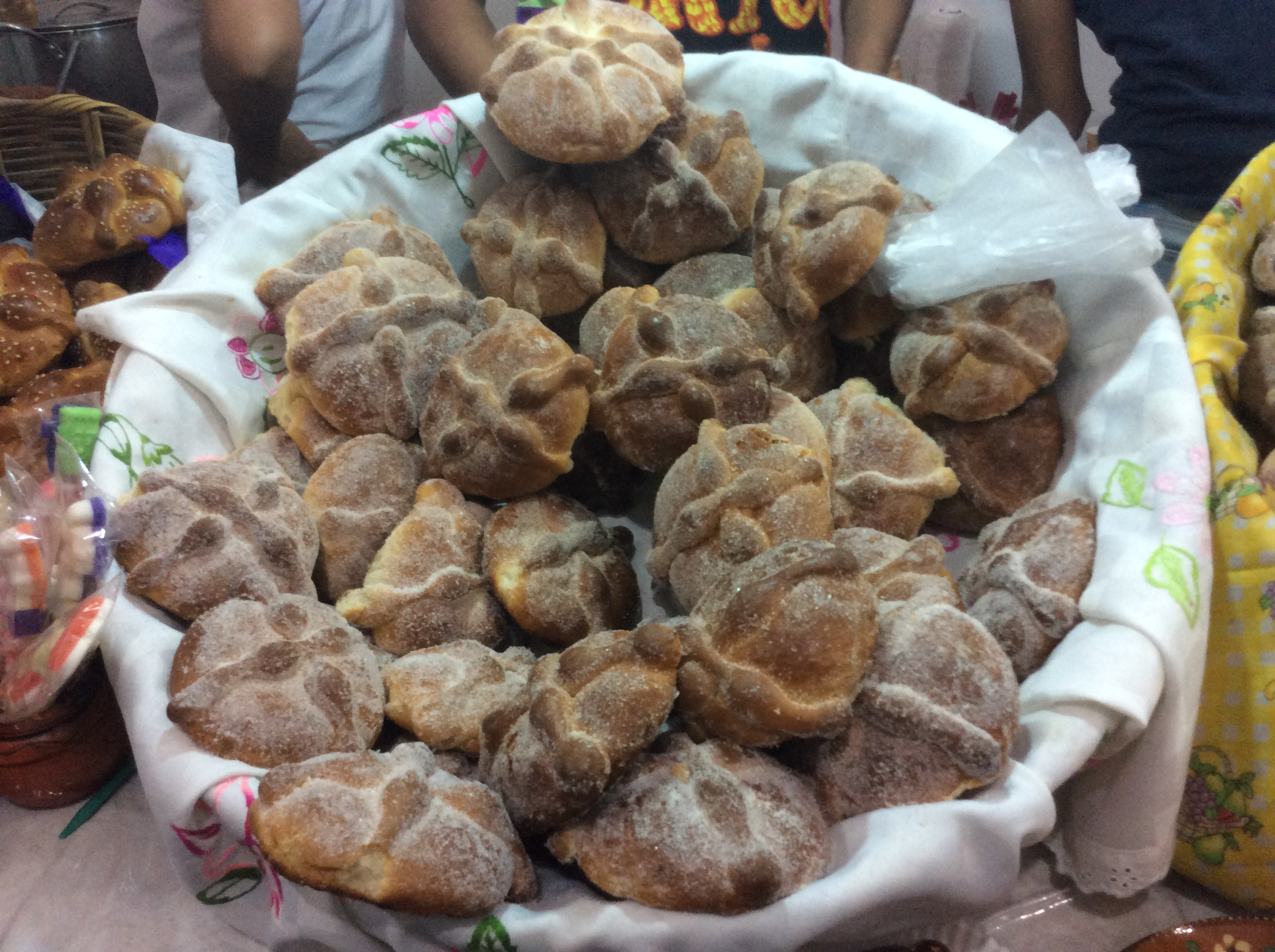 Pan de muerto en Coyoacán, México D.F.